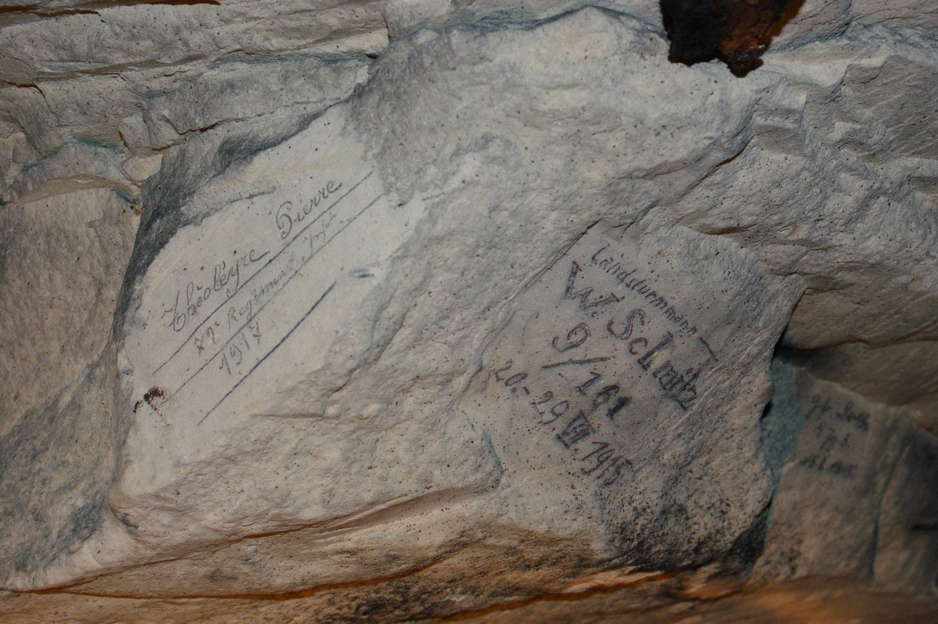 Deux signatures cohabitant, d'un soldat français et d'un soldat allemand, dans la carrière de Froidmont, l'endroit étant occupé successivement par les deux armées.